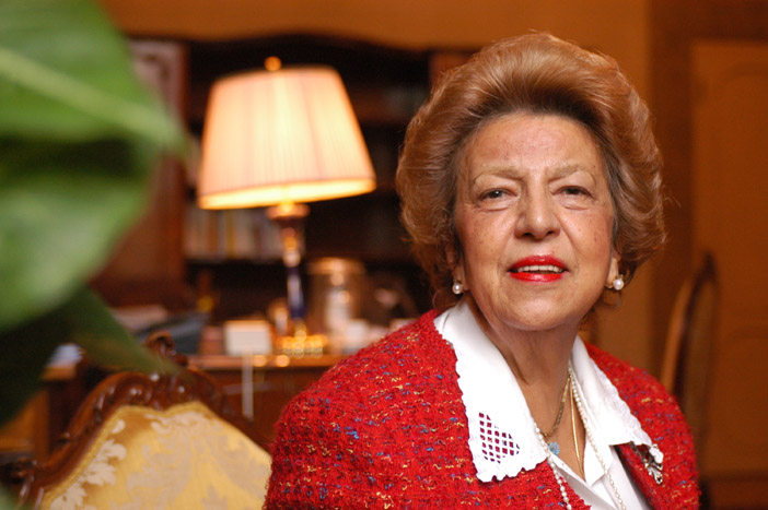 Foto del Giudice Saulle scatta nel mese di novembre del 2005